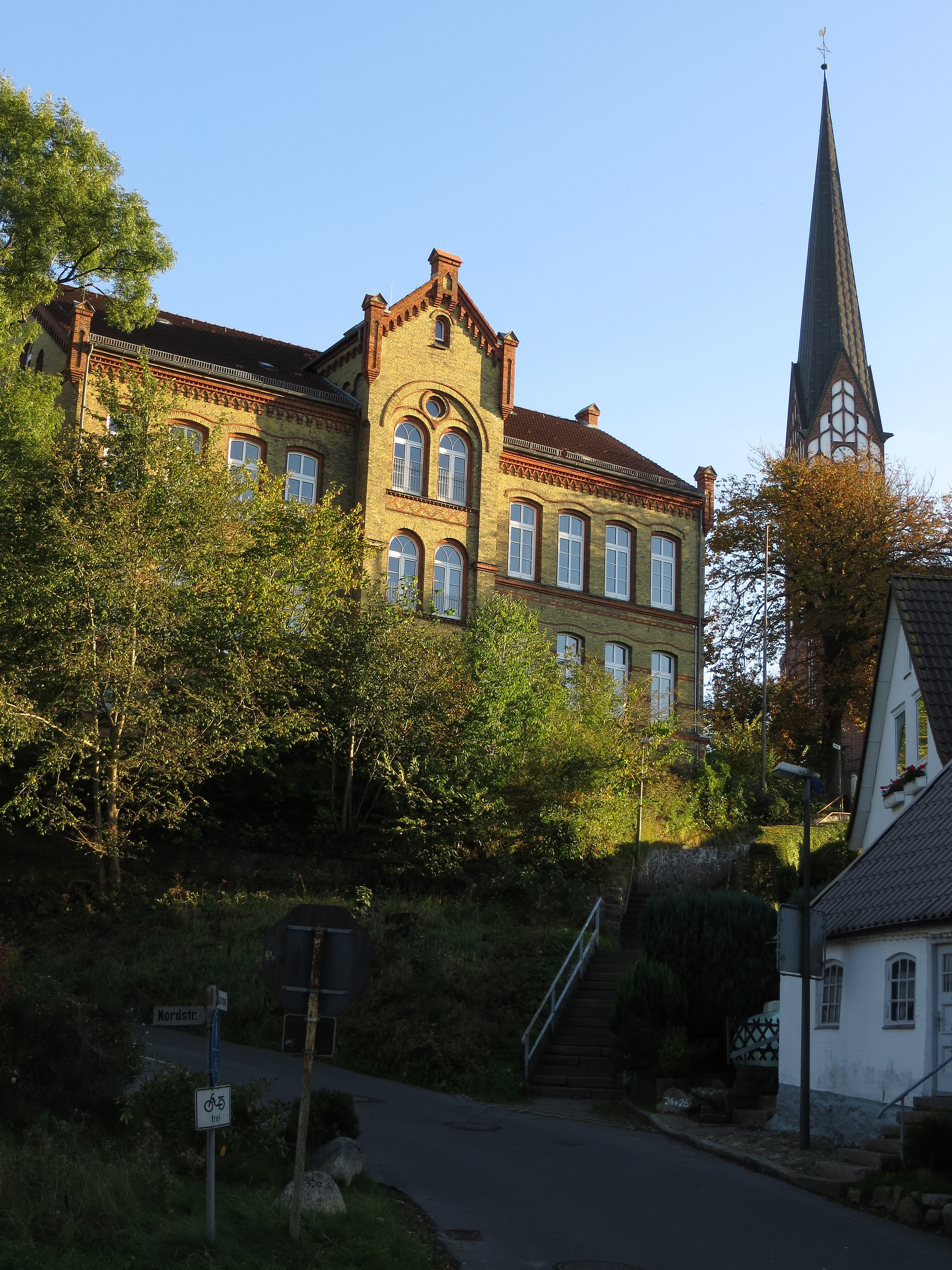 Offener Kanal Flensburg, Bild 02